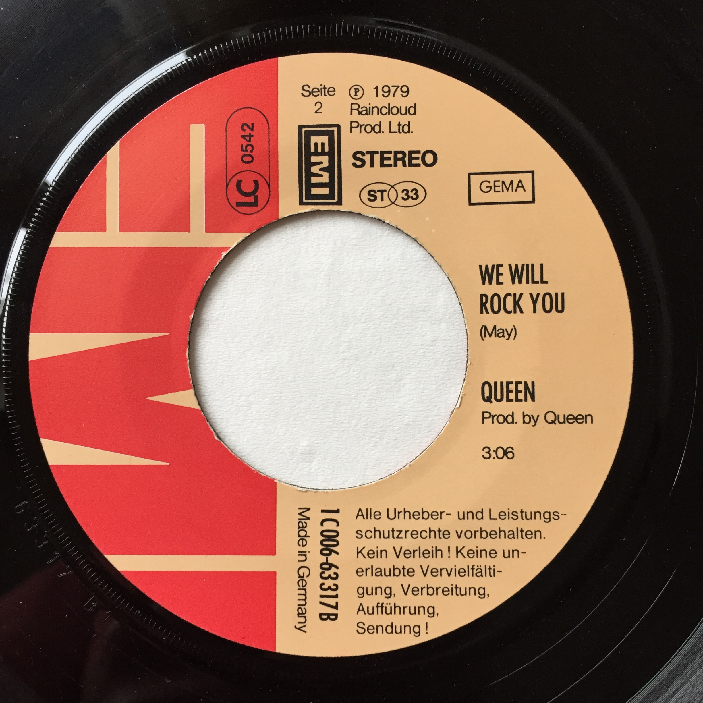 Label der Studio-Single